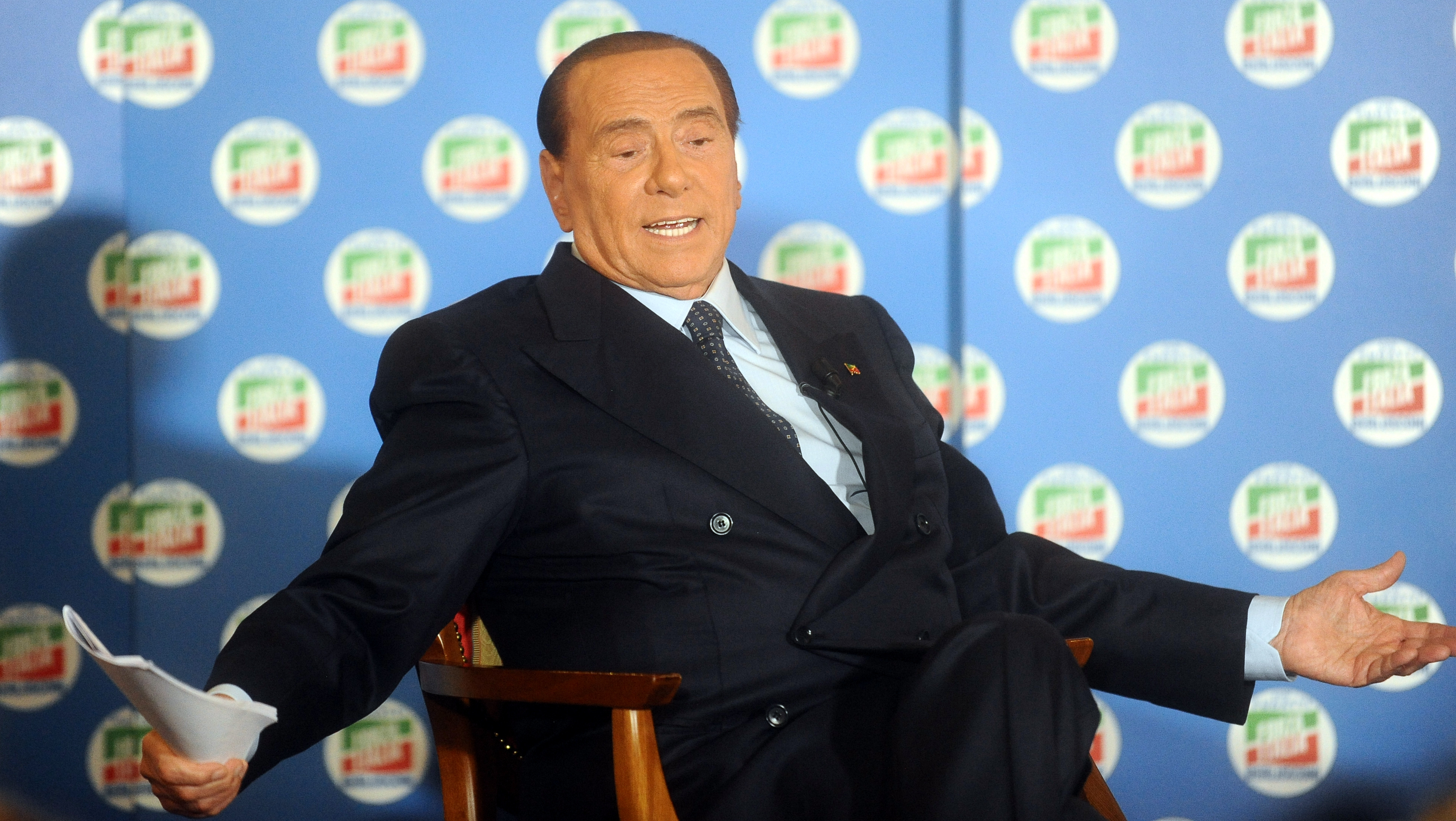 Silvio Berlusconi al Grand Hotel Trento per la campagna elettorale delle elezioni provinciali.